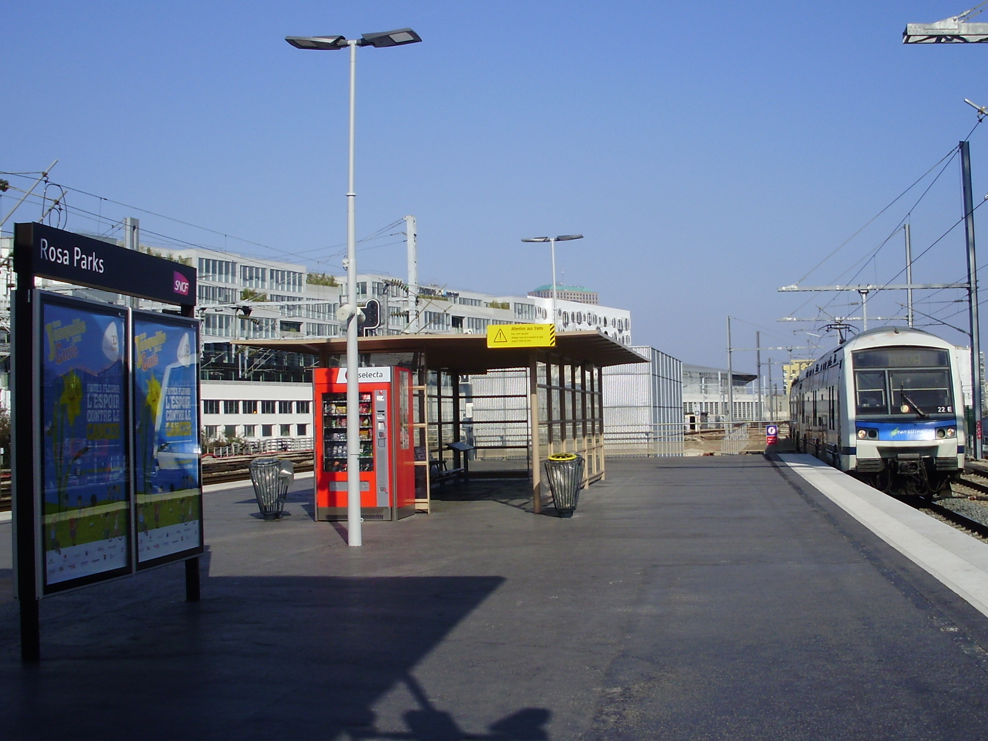 Rame à deux niveaux de type Z 22500 arrivant à la gare Rosa Parks, à Paris 19e, France, et se dirigeant vers la gare Haussmann - Saint-Lazare.